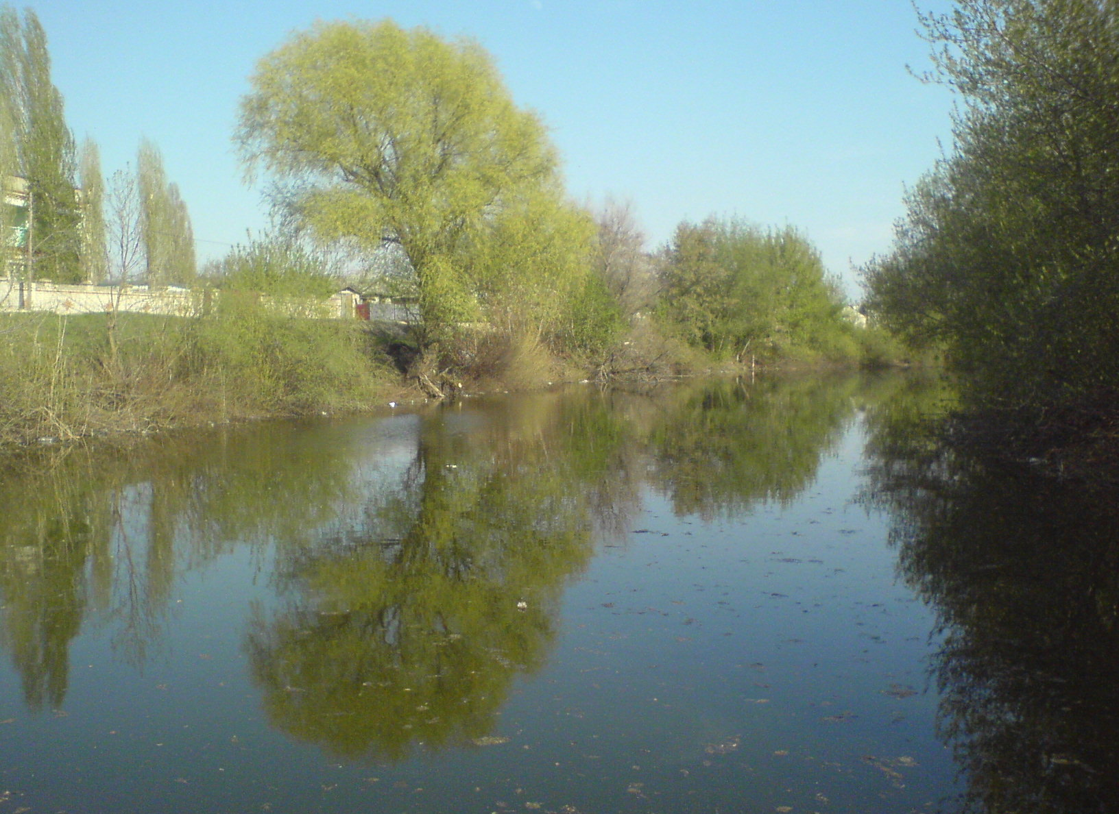 Арчеда в городе Фролово.